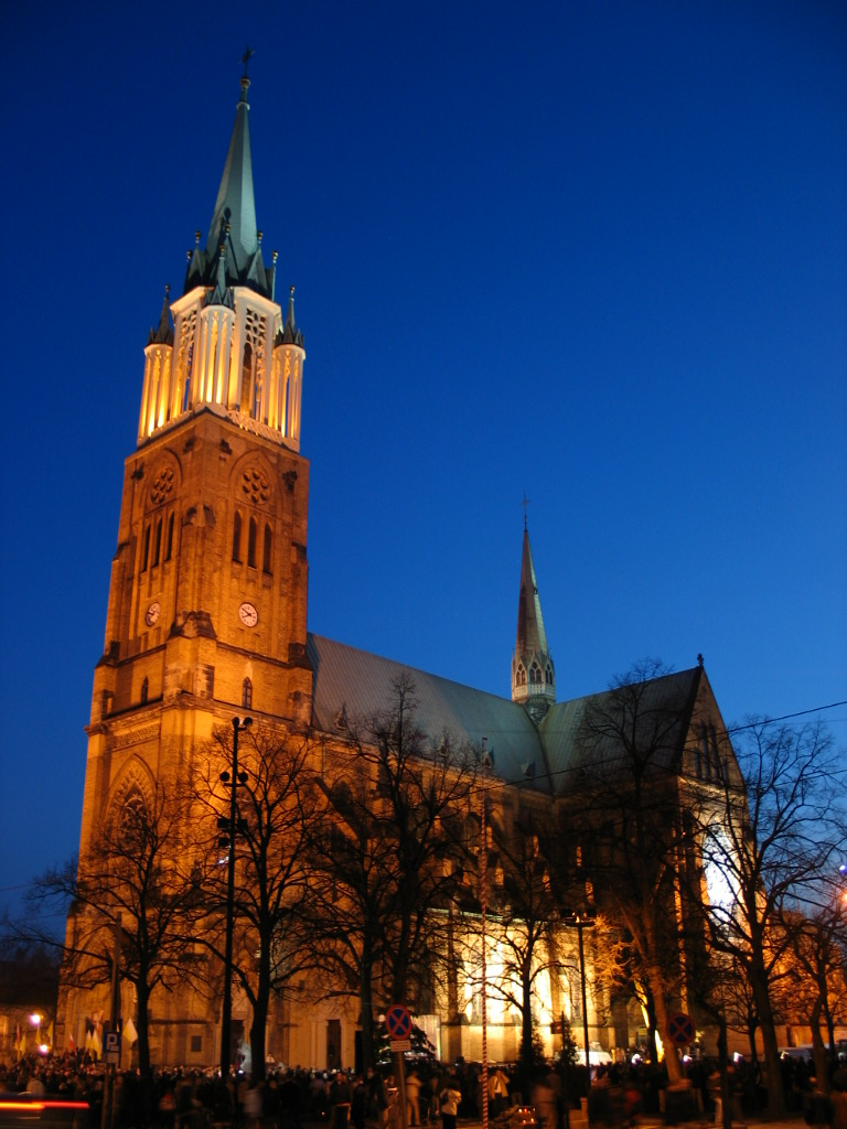 Archikatedra św. Stanisława Kostki w Łodzi